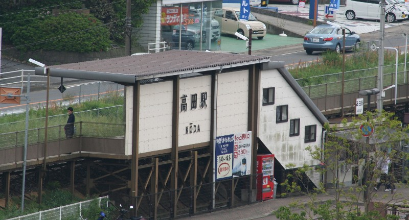 koda Japan Railway station